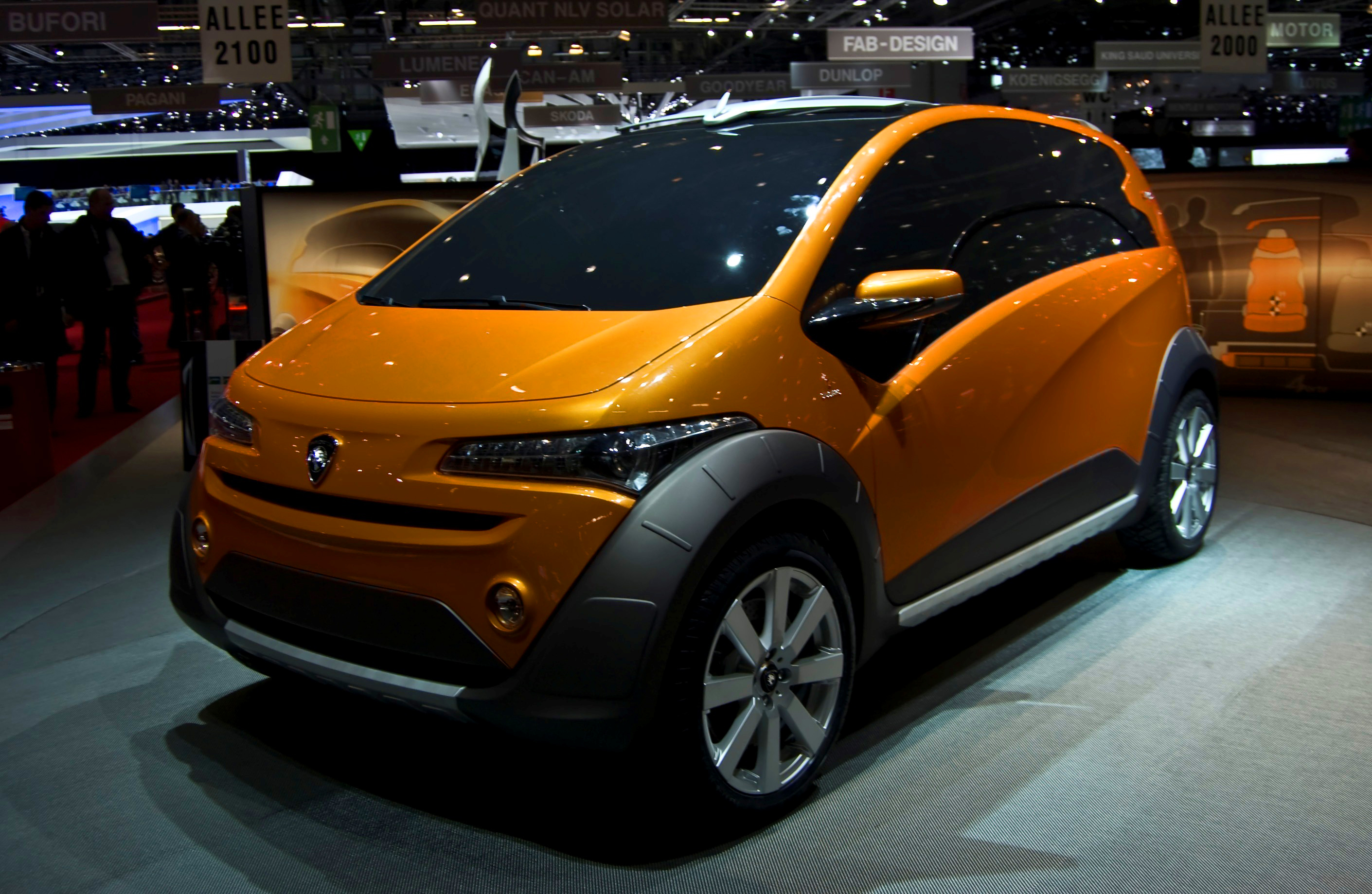 Giugiario Proton EMAS3 en el Salón de Ginebra 2010.